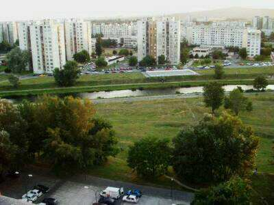 Moja fotka Chorvátskeho ramena...